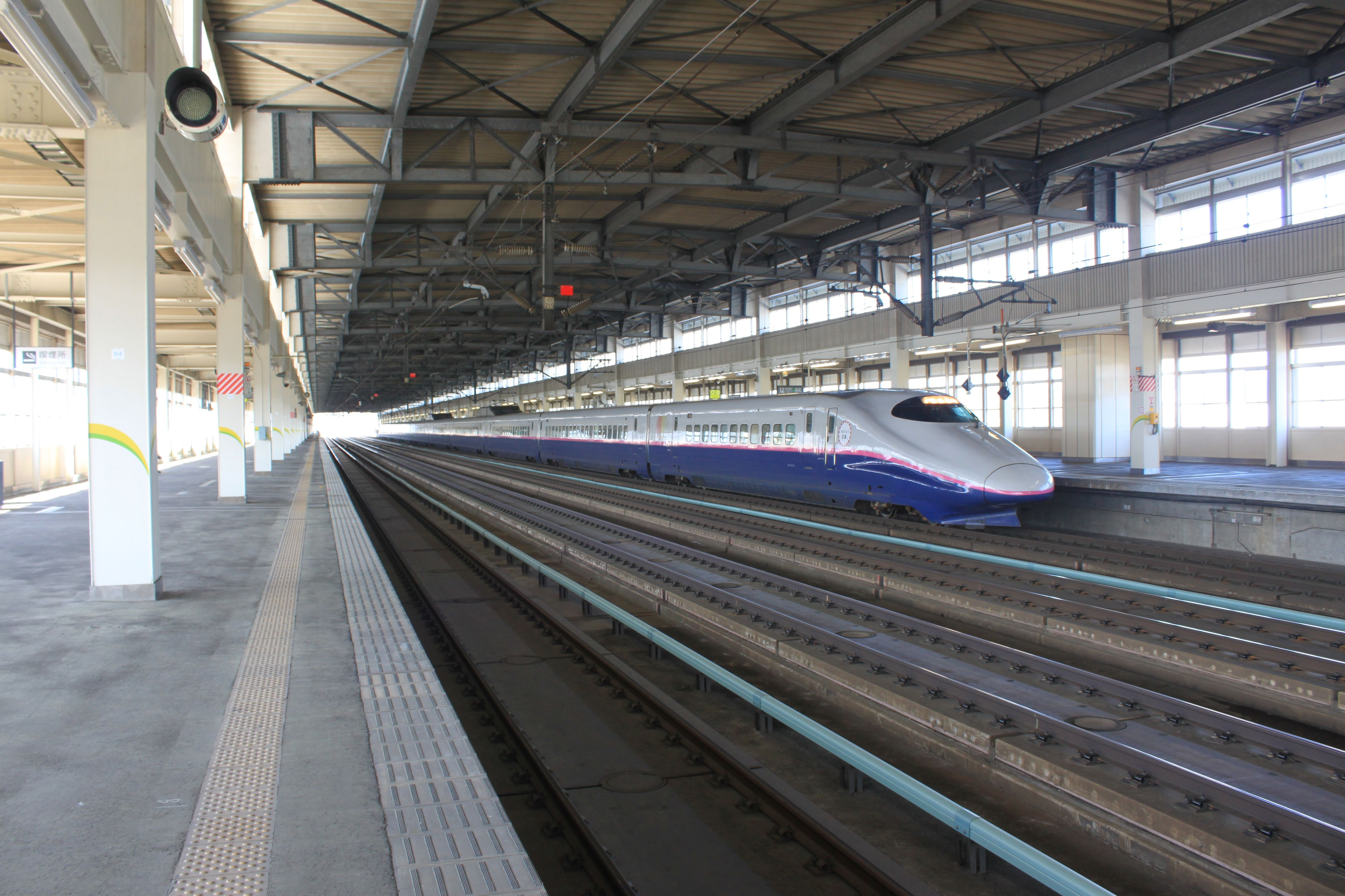 一ノ関駅